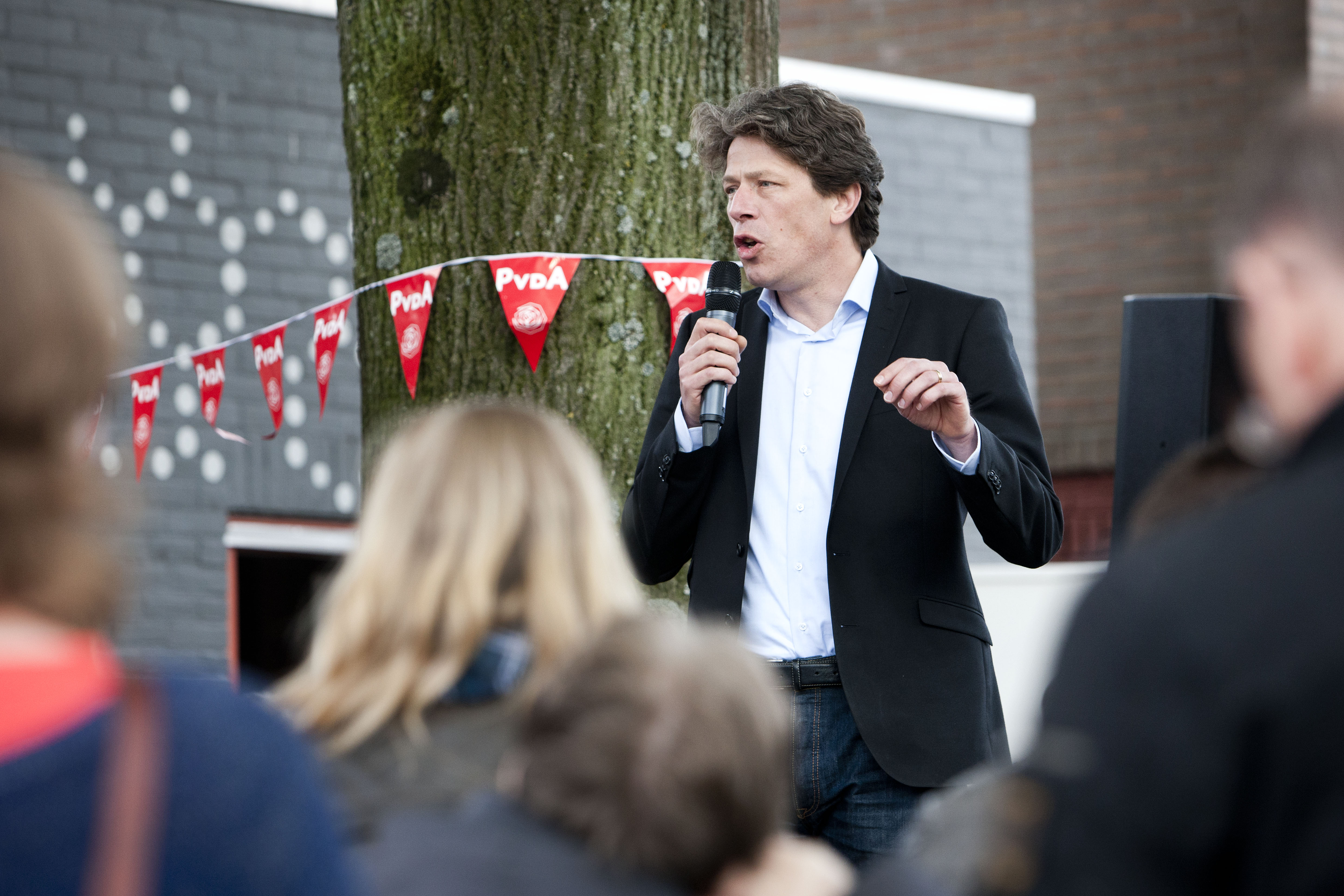 3 mei 2014, Eindhoven. Met een buurtbarbecue in de wijk Woensel-West heeft de Partij van de Arbeid de 'hete fase' van de campagne voor de verkiezingen van het Europees Parlement op 22 mei afgetrapt.